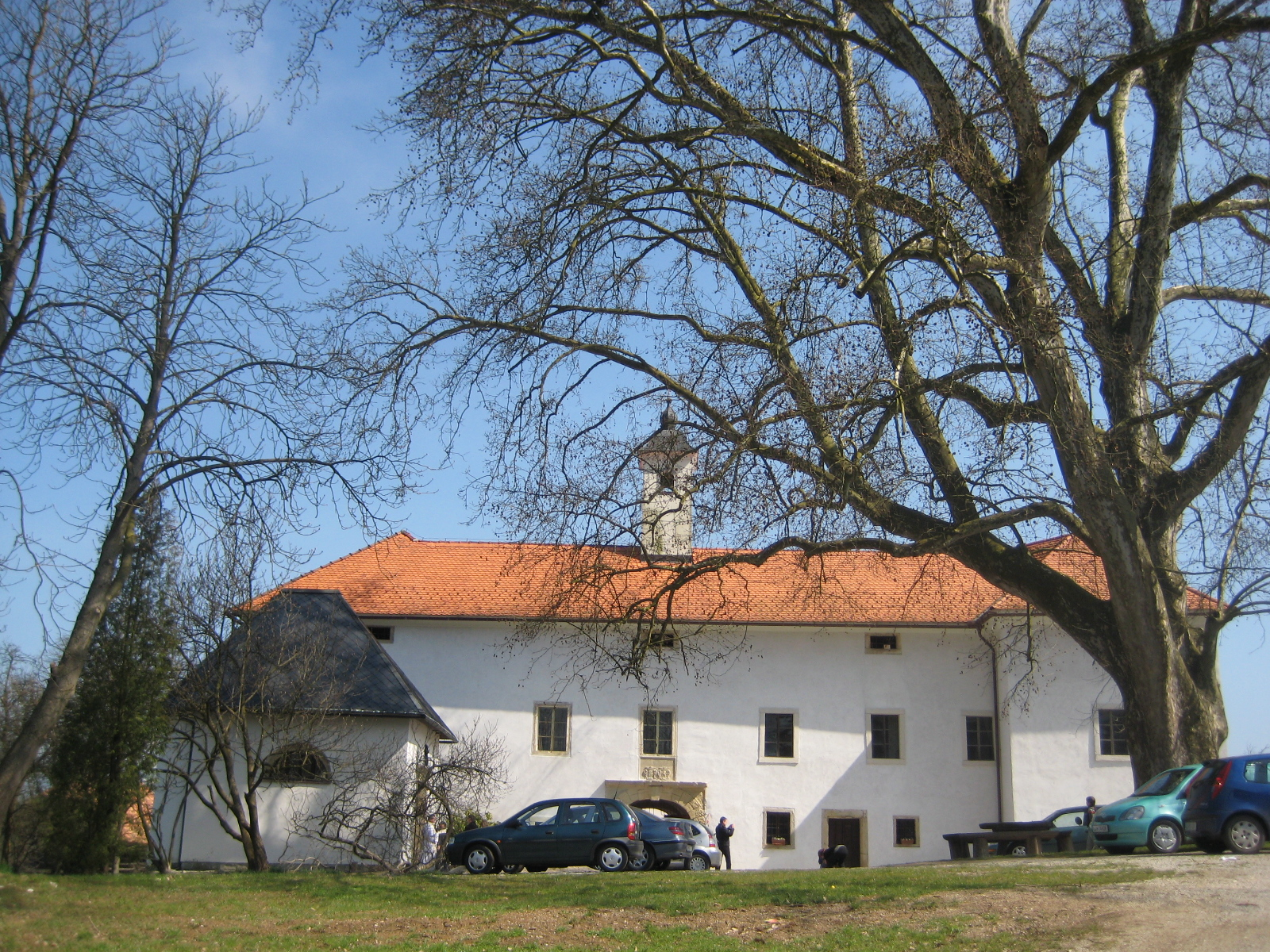 Tuštajn castle, Slovenia